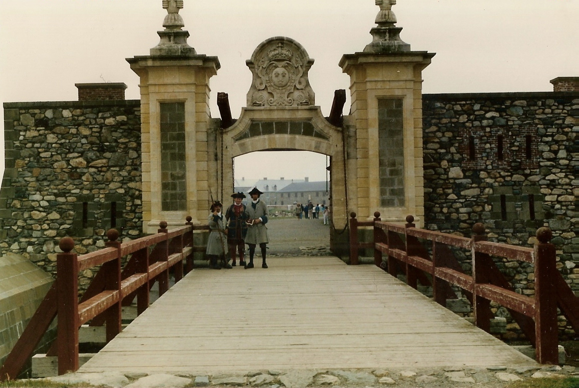 Porte d'éntrée de Louisbourg